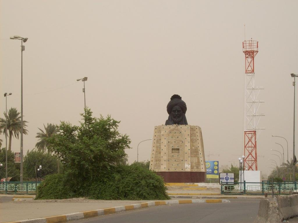 تمثال ابو جعفر المنصور، المنصور، بغداد، العراق. النحات: خالد الرحال